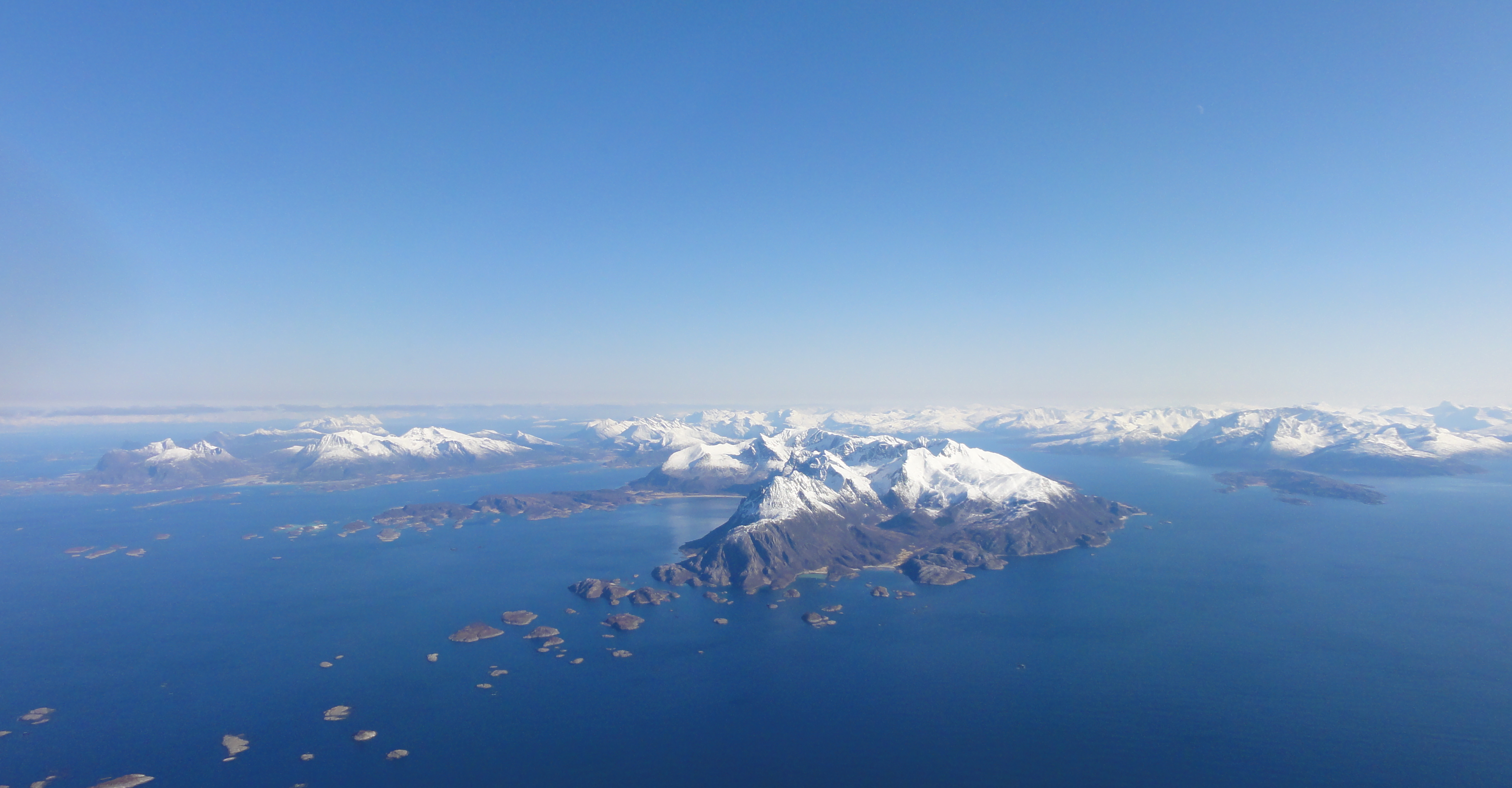 Helnessund, Brennsundvik, Nordskott og Nordfolda i Steigen kommune sett fra fly.